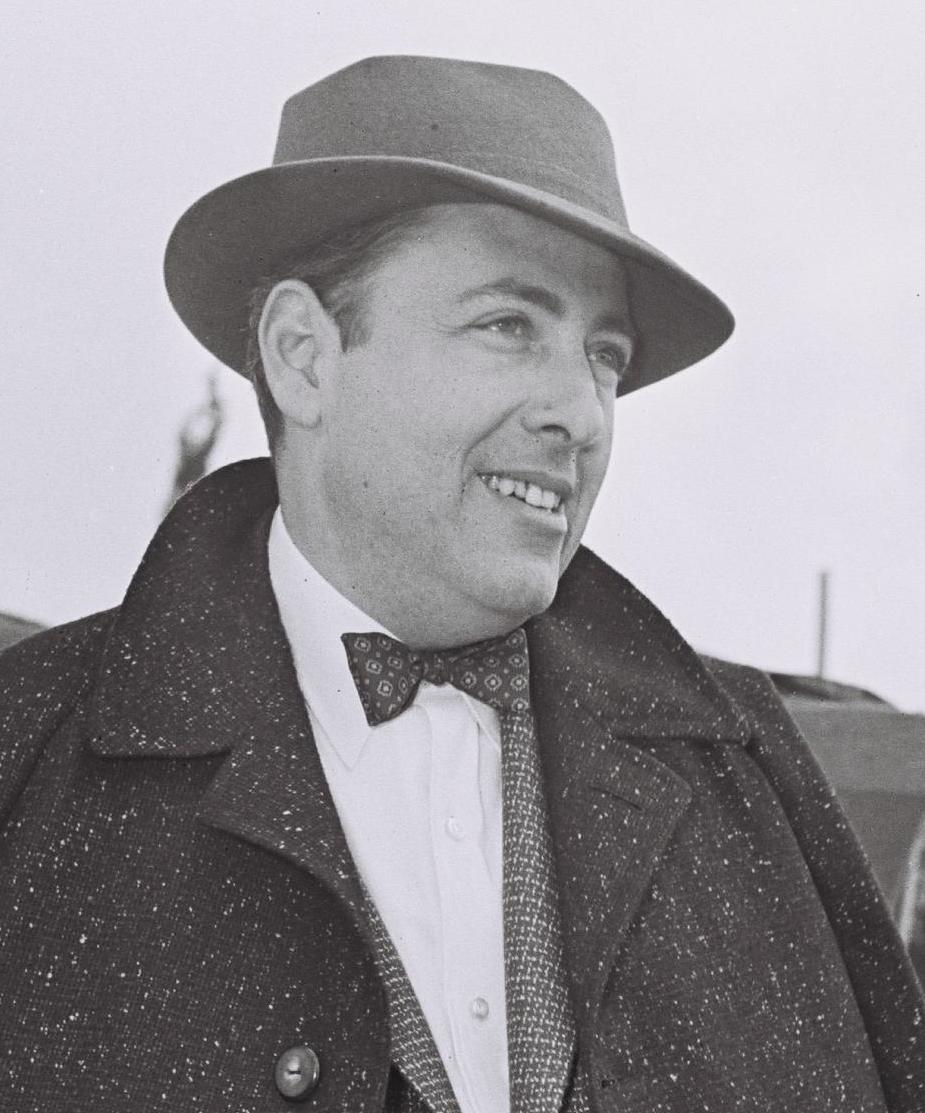 Herman Wouk in Jerusalem, 1955 INDEPENDENCE DAY 1955. HERMANWOUK, AUTHOR OF CAINE MUTINY, AT THE LIBERTY BELL PRESENTATION IN JERUSALEM.